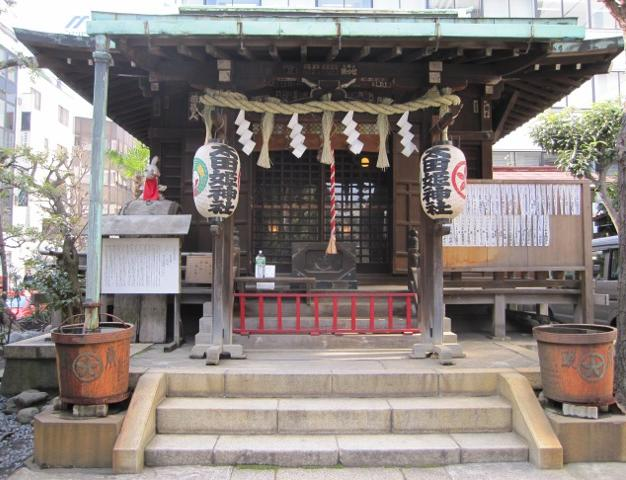 太田姫稲荷神社（2012年3月撮影）